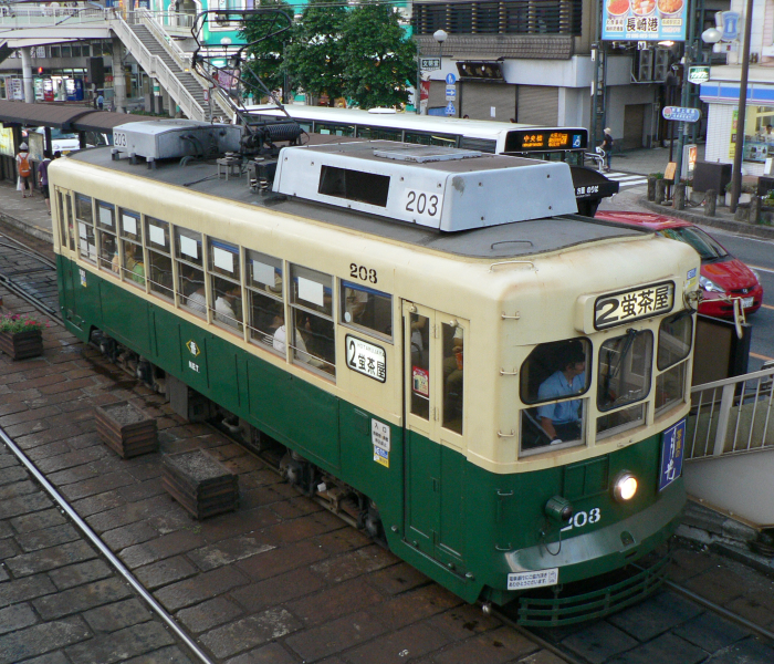 長崎電気軌道2号系統。通常は深夜1往復のみだが、祭りや年越しの際にも運転される。写真は精霊流しのため日中から運転されていた2号系統、蛍茶屋行き。